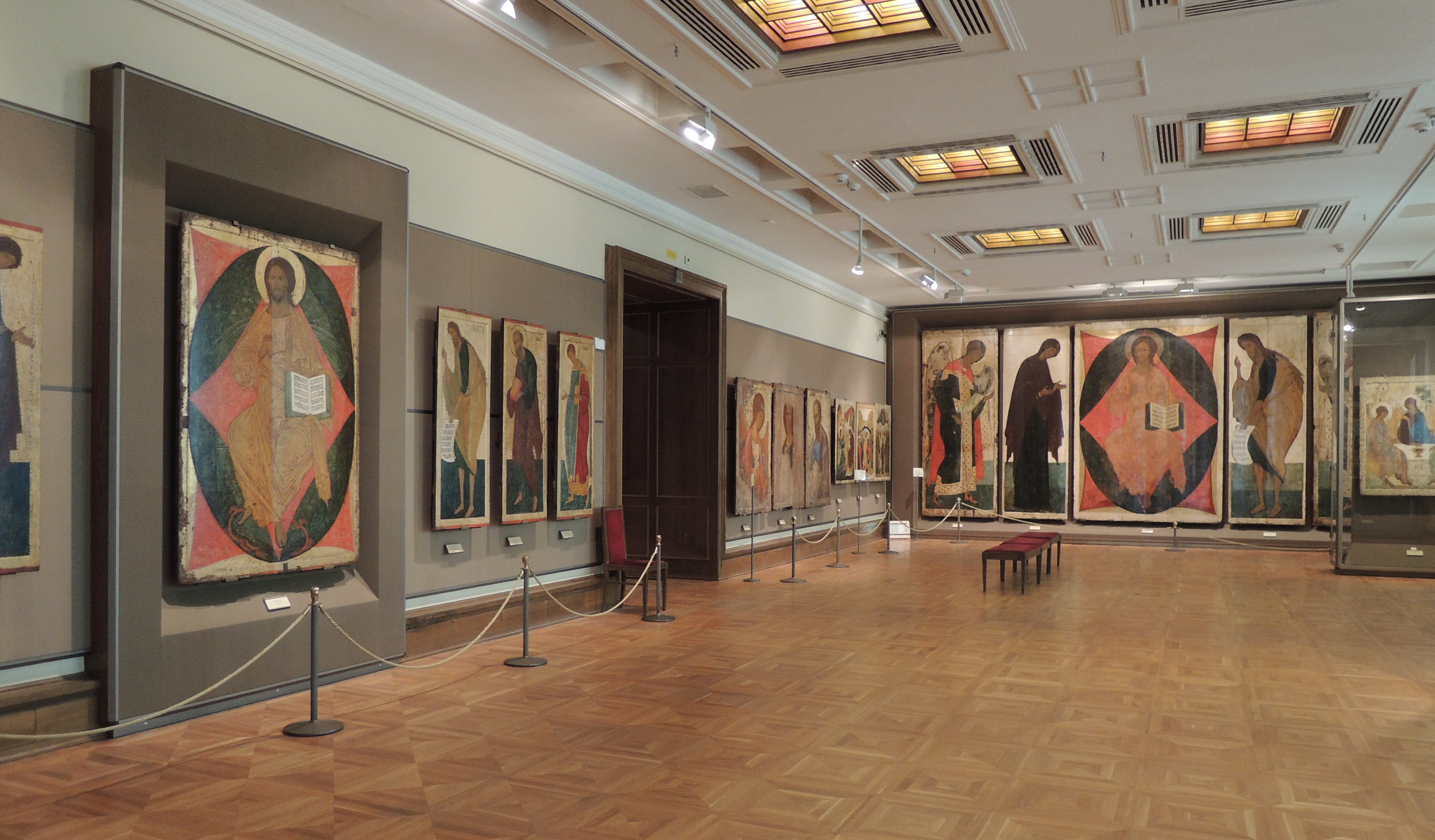 Третьяковская галерея